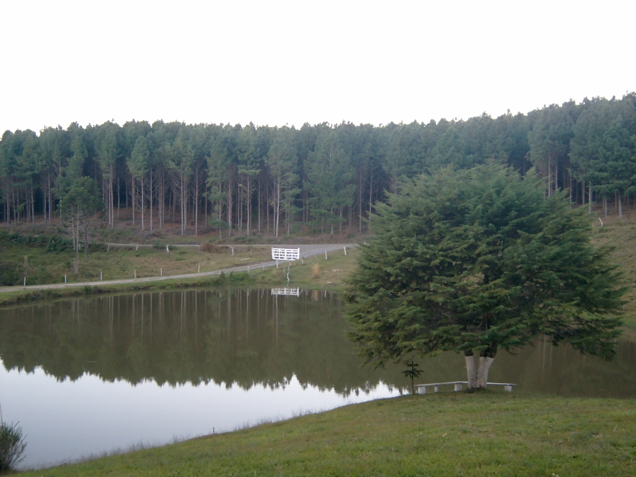 Foto tirada de reflorestamento em fazenda em Bocaina do Sul, destinado à fabricação de papel, Klabin (Correia Pinto SC). Use livre.